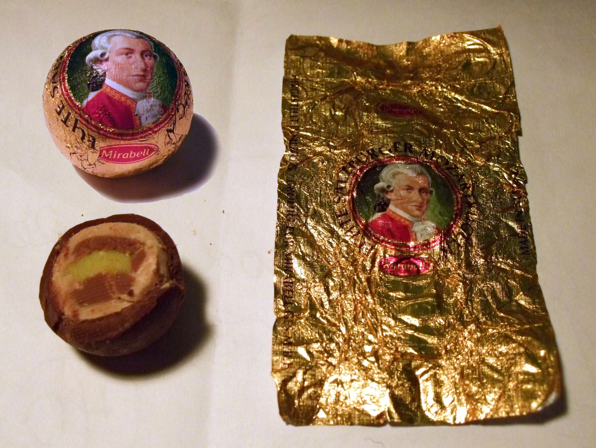 Echte Salzburger Mozartkugeln aus dem Hause "Mirabell", dem größten Mozartkugel-Hersteller Österreichs.